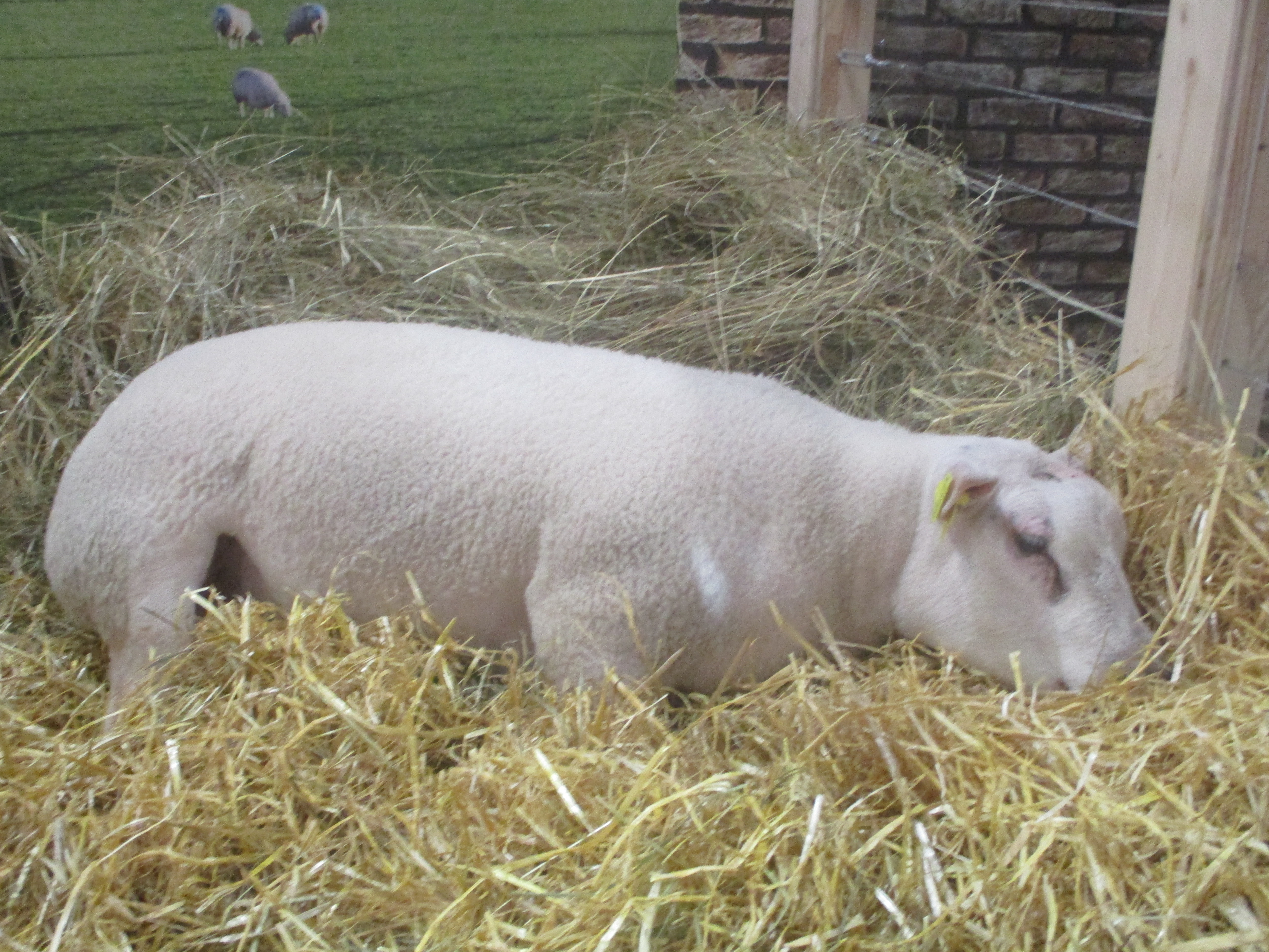 Bélier beltex au SIA 2019.